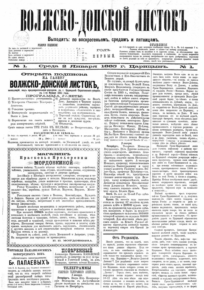 Первый номер газеты "Волжско-Донской листок" от 2 января 1885 года